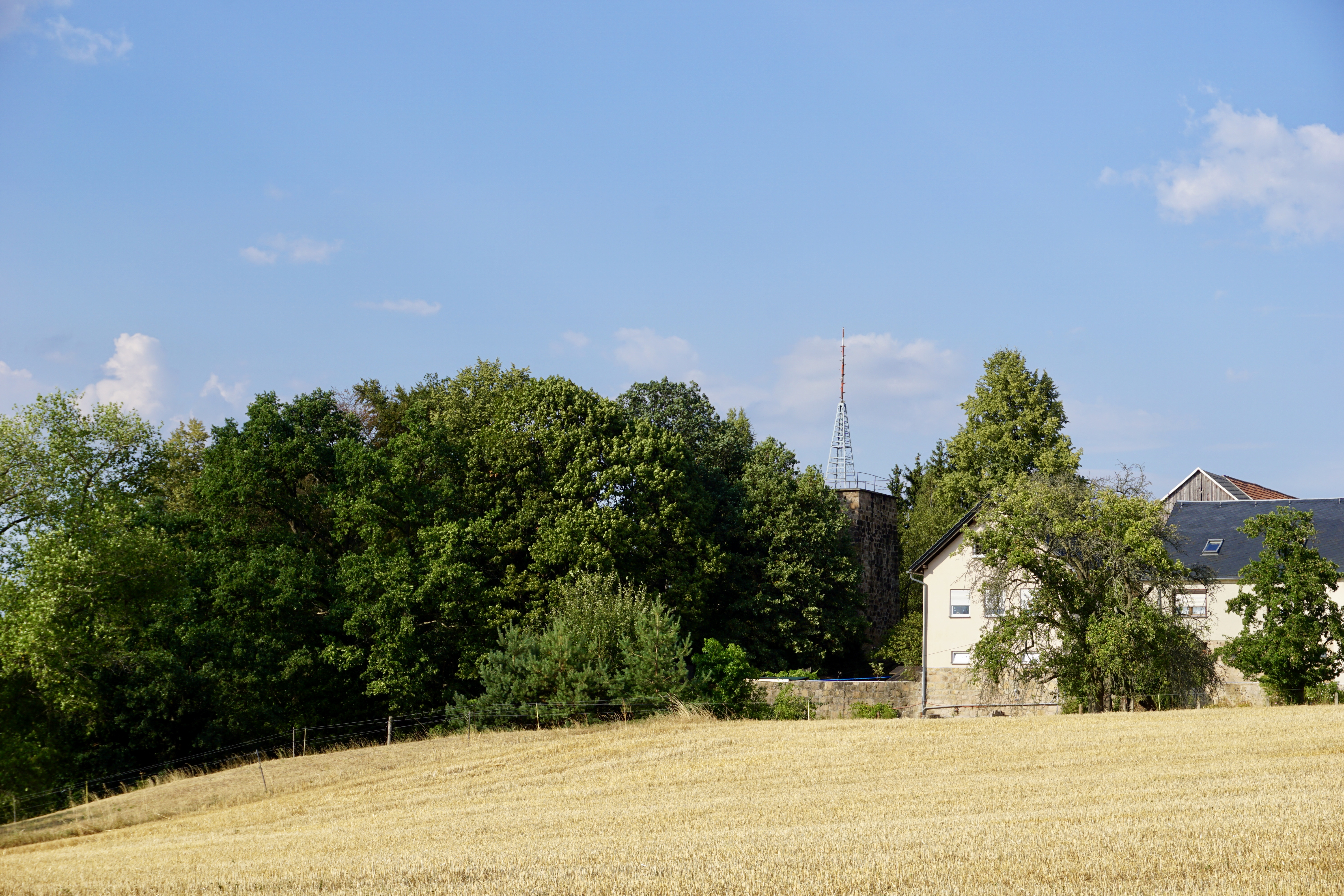 Bauernhof mit ehemaliger Windmühle in Giegengrün